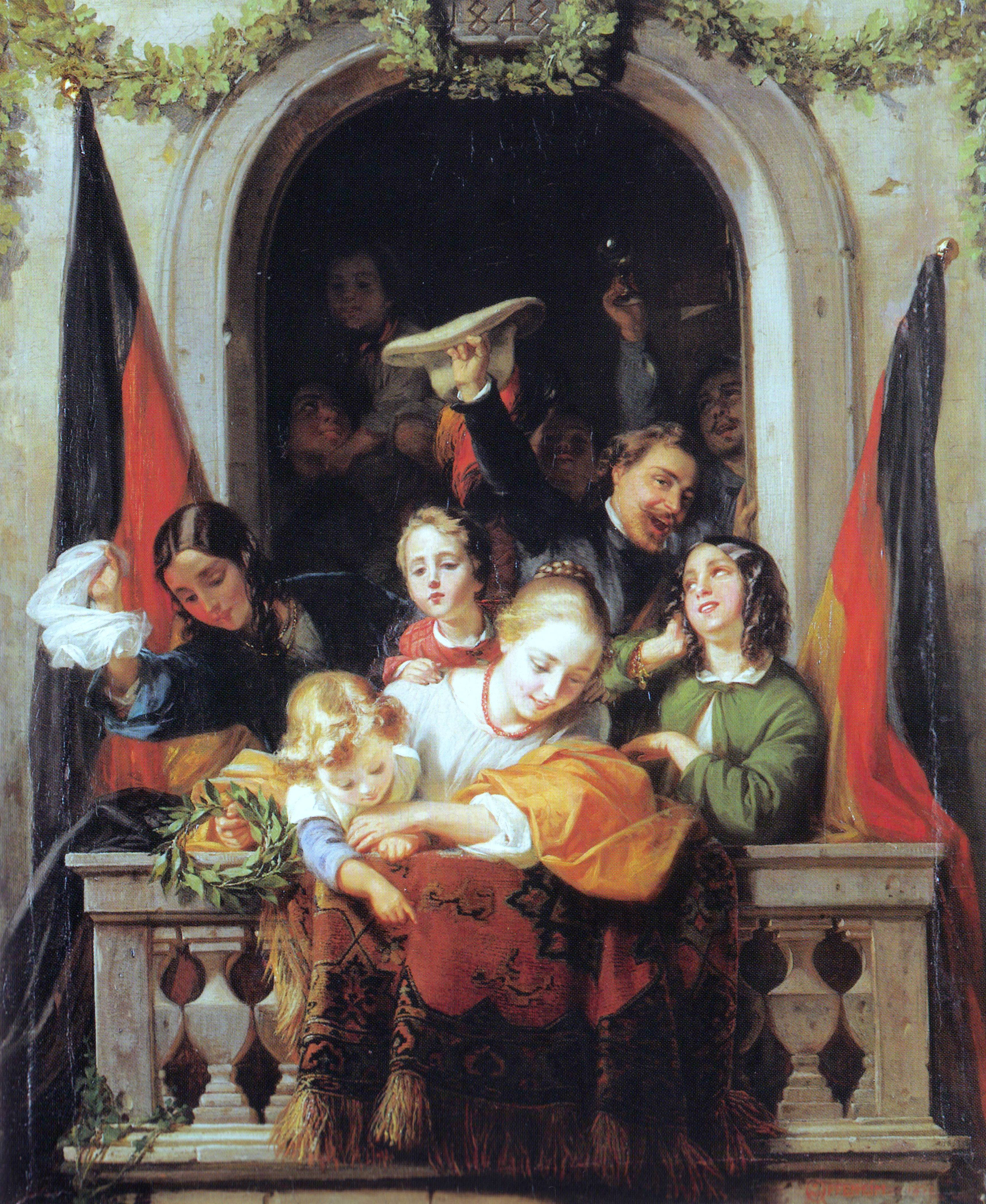 Gemälde von Moritz Daniel Oppenheim: Szene im Fenster beim Einzug des Reichsverwesers, 1852.